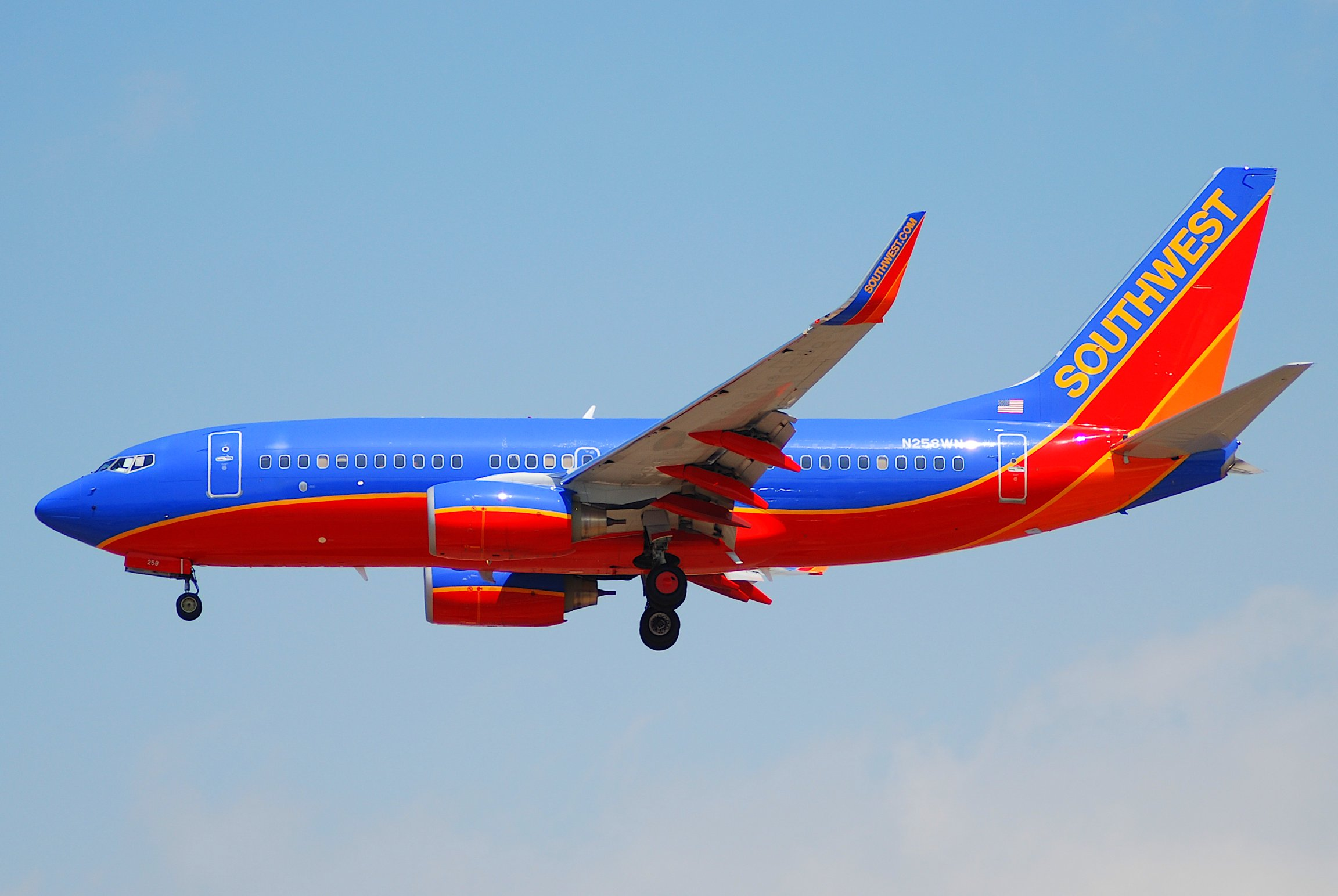 Southwest Airlines Boeing 737-700; N258WN@LAX;21.04.2007/466kp